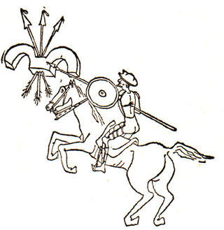 Símbolo de la revistas "Las Españas" (México. 1946)